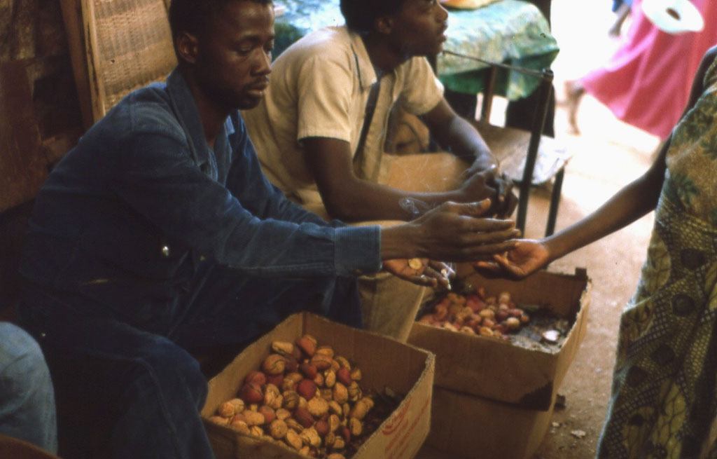 Market in Kedougou, Senegal - Kola nuts (photo légèrement retouchée pour la luminosité)